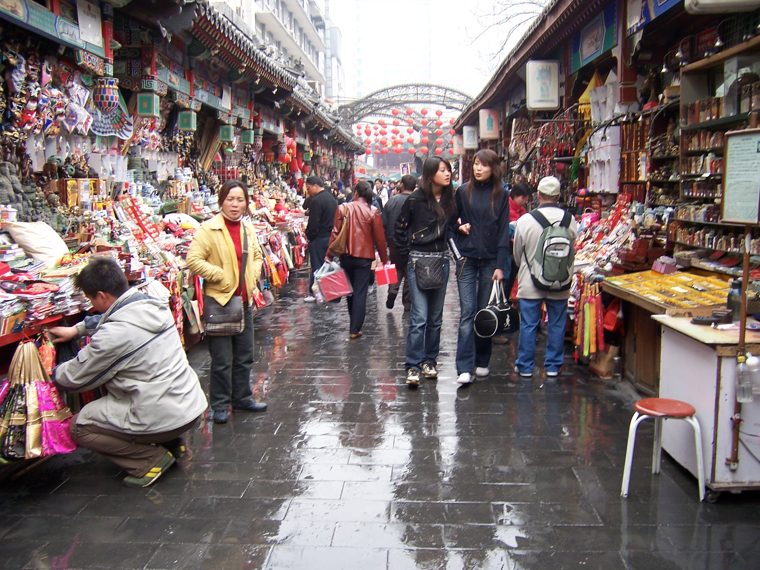 China - Beijing 17 - Market 王府井民俗文化街